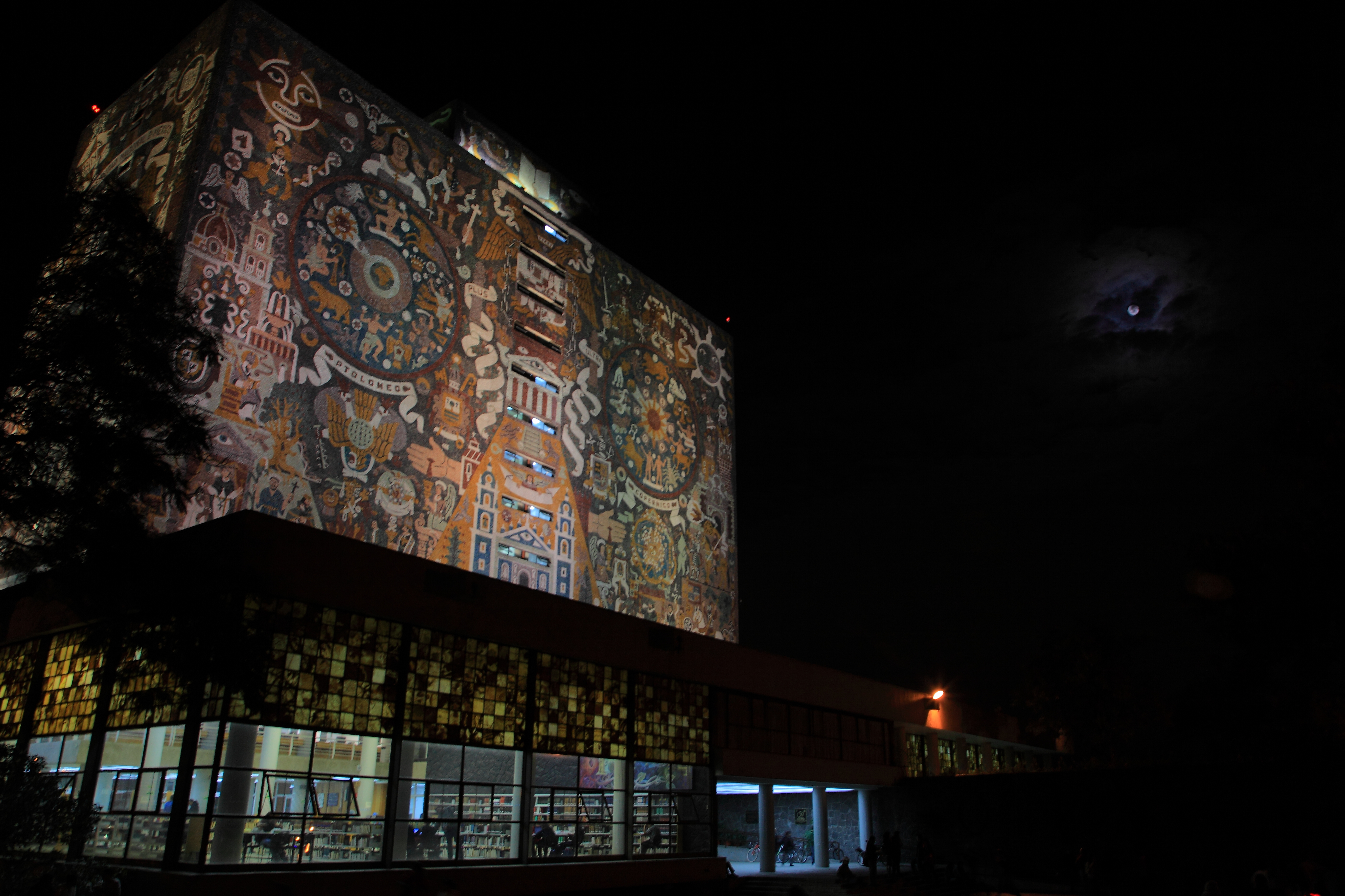 Biblioteca Central de la UNAM.